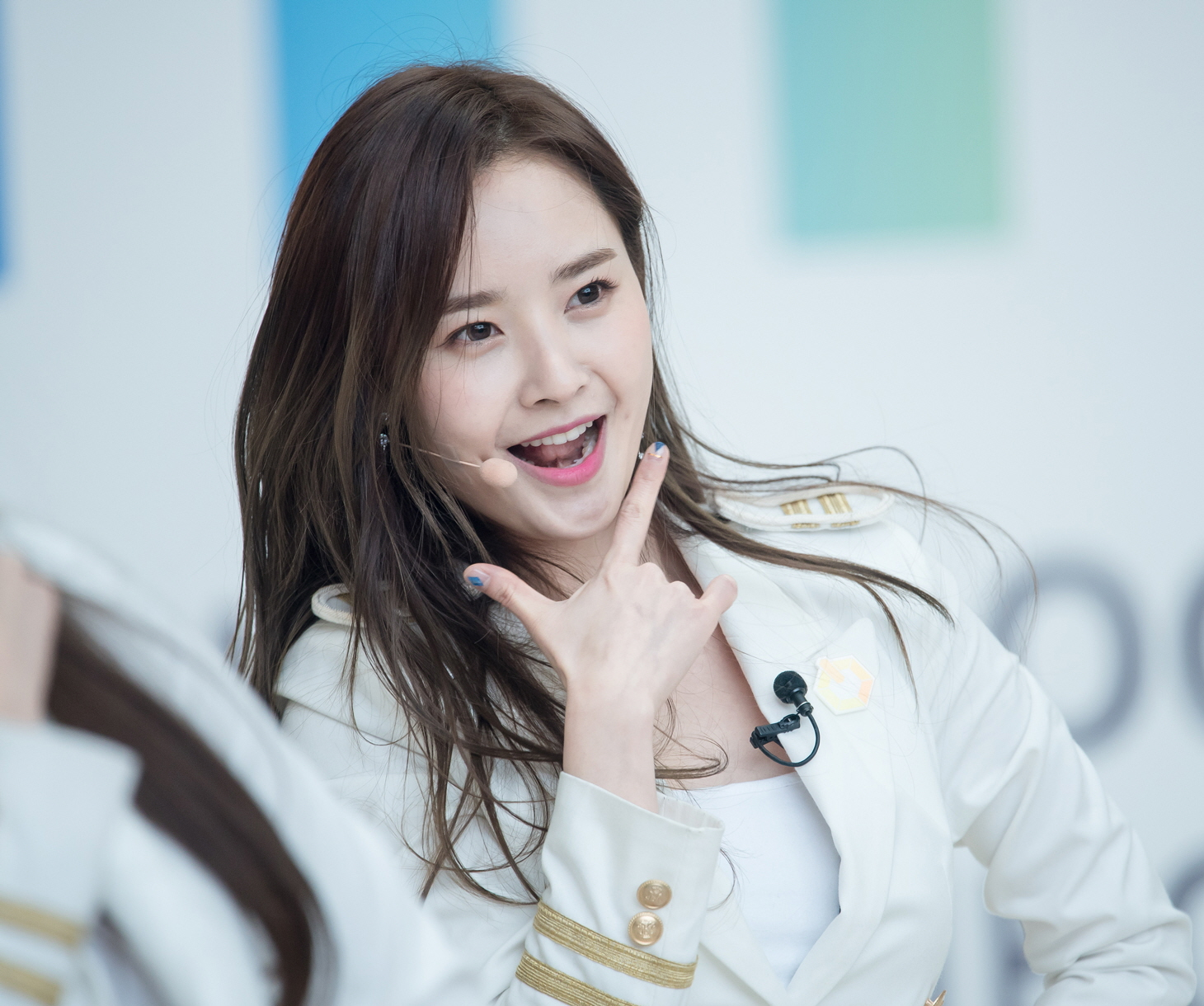 180211 더유닛 유닛G